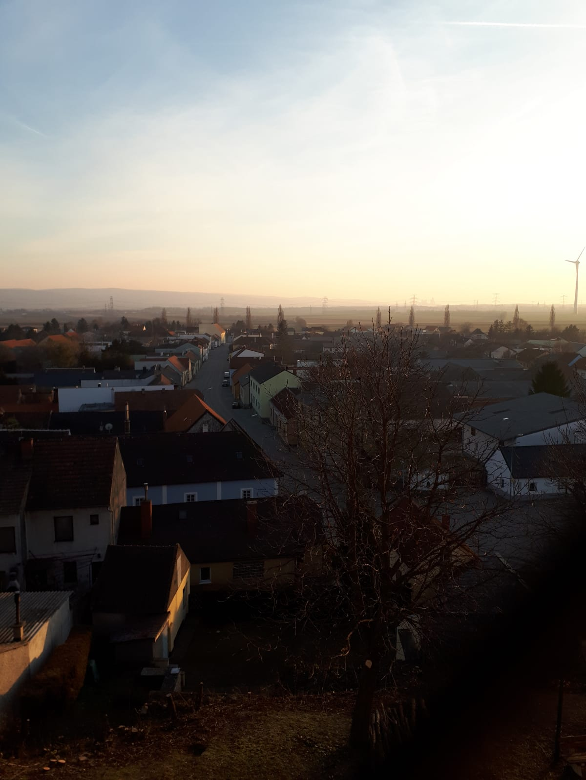 Blick über Stixneusiedl